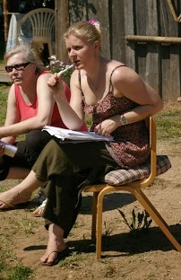 Ingrid Ulst Alle-Saija Teatritalus